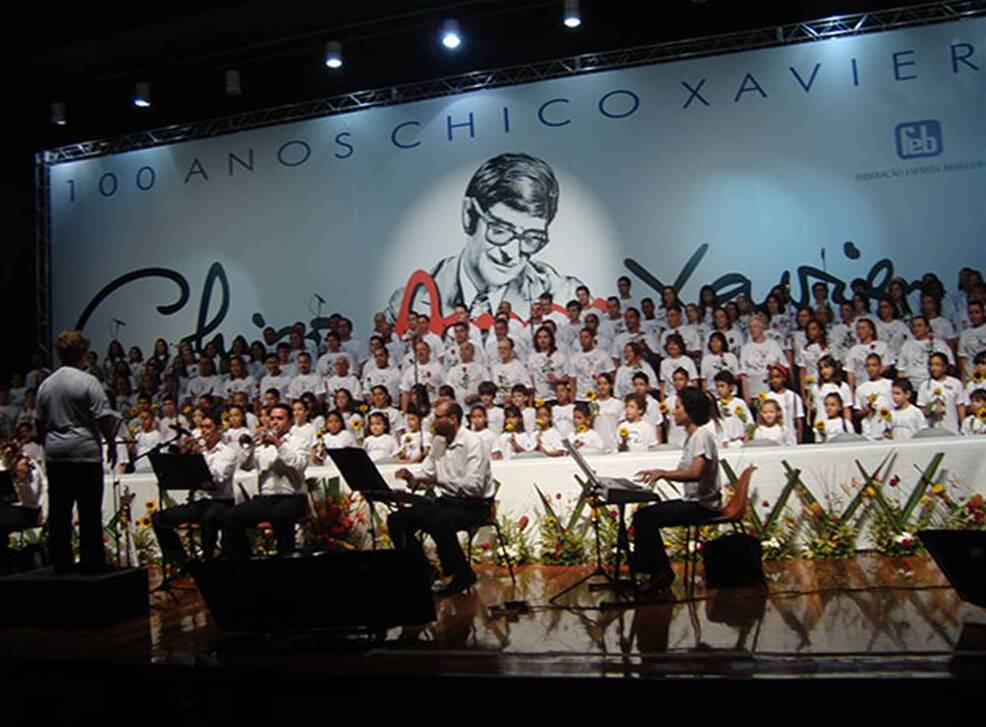 Congrès brésilien sur thème "Chico Xavier, médiumnité et charité comme Jésus et Kardec". Palais des congrès Ulysses Guimaraes, brasilia, 17 avril 2010.